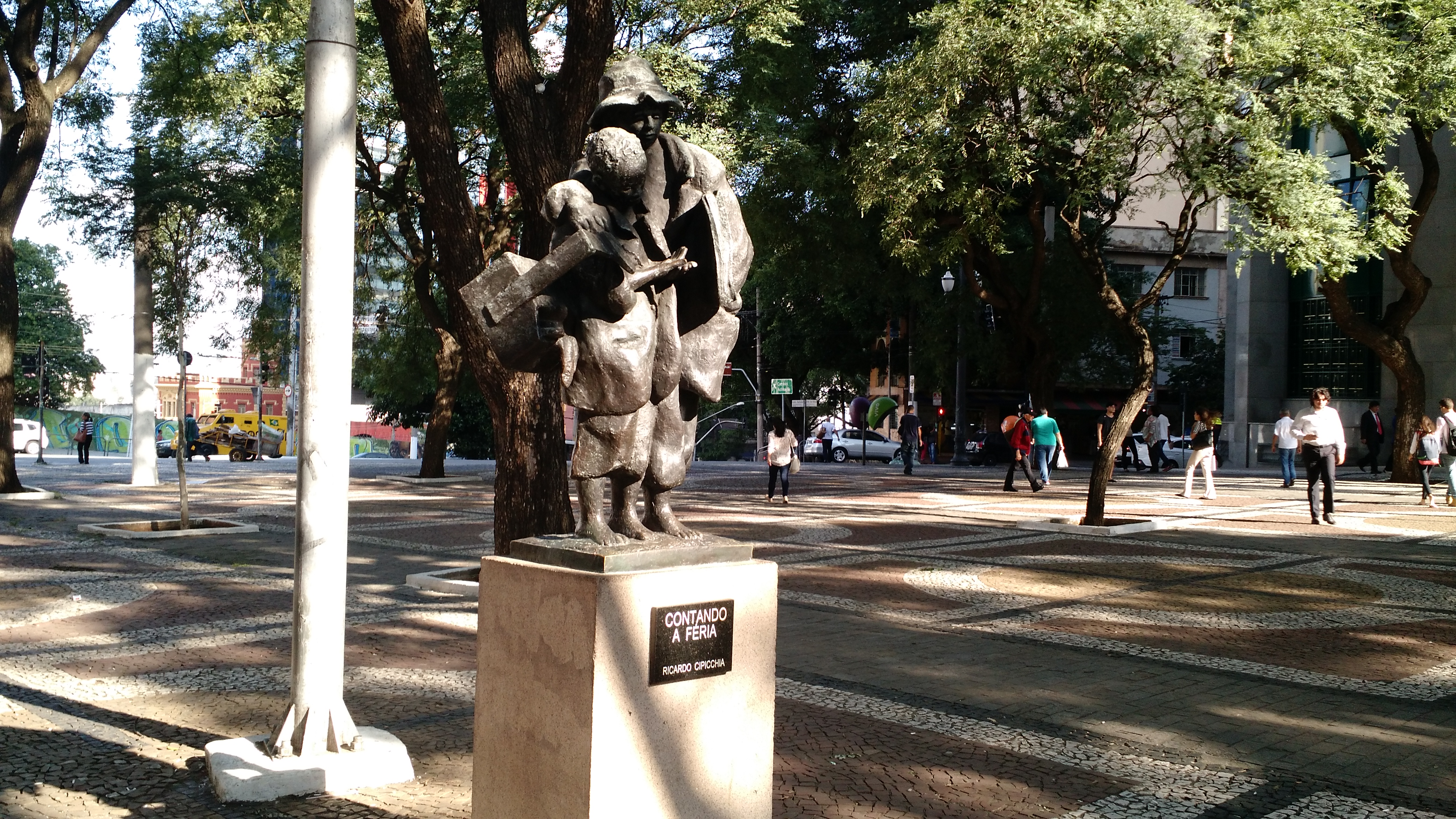 Visão lateral/frontal do monumento "Contando a Féria", localizado na Praça Doutor João Mendes - Sé, São Paulo, Brasil.